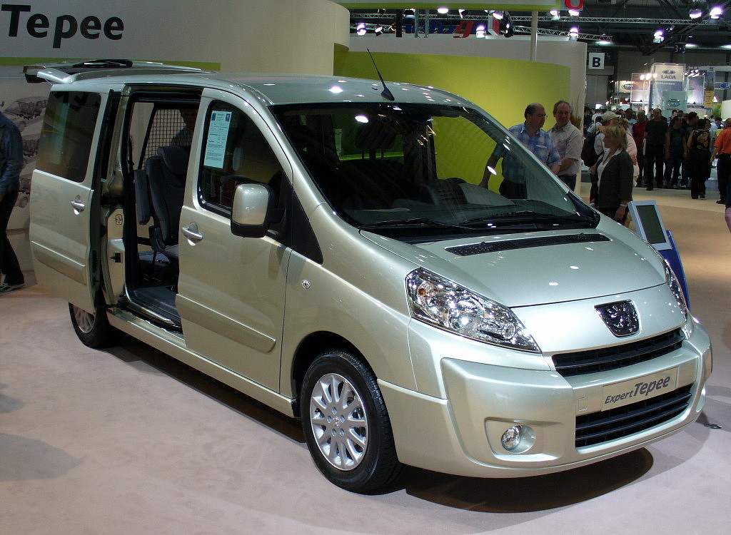 Peugeot Expert Tepee